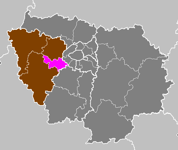 Maps of arrondissements and cantons of France: Département des Yvelines - Arrondissement de Versailles.PNG (Région Île-de-France)